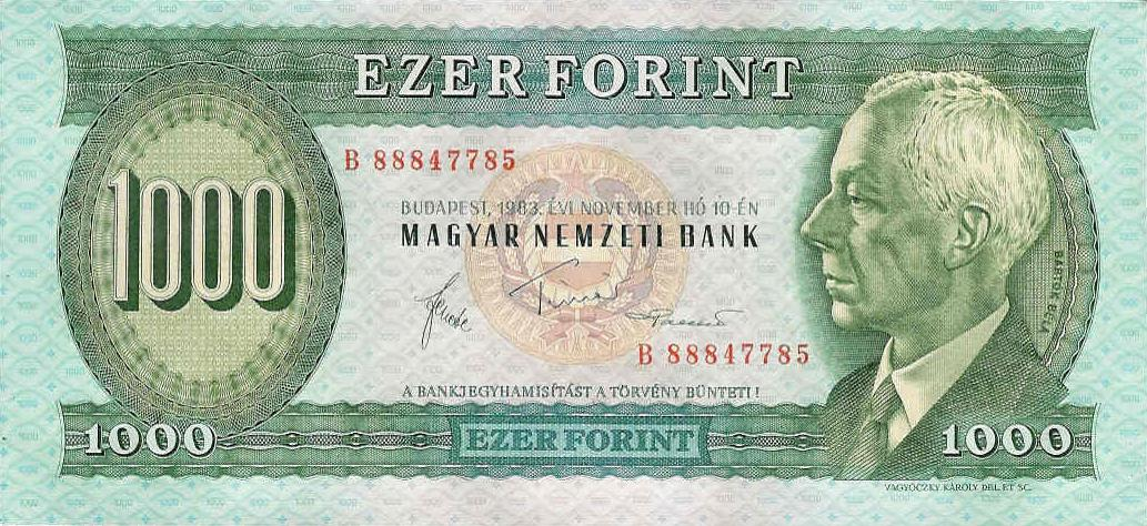 1000 Hungarian forint (1983) - obverse. Picture: Béla Bartók, composer.